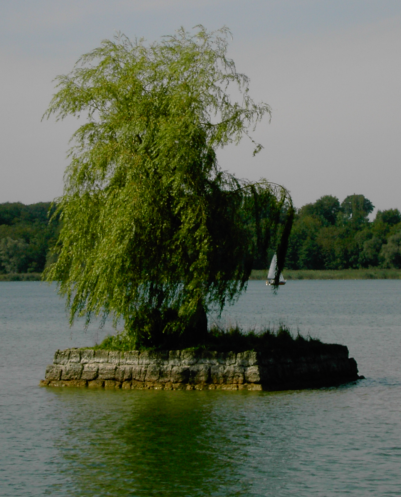 Der Schalch ist eine winzige Insel im Chiemsee, unmittelbar westlich der Fraueninsel.